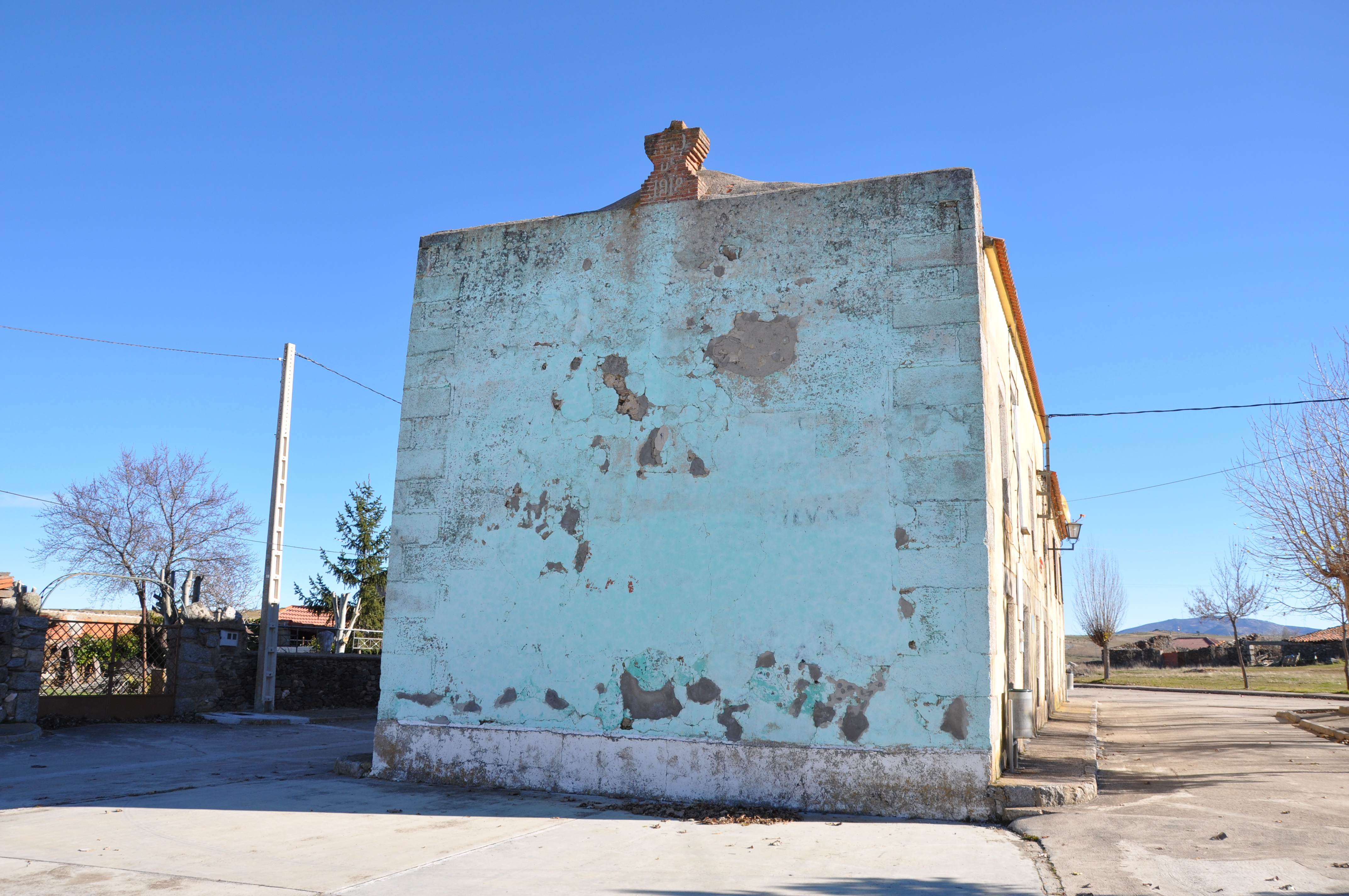 Frontón de pelota en Gallegos de Sobrinos, Ávila, España.